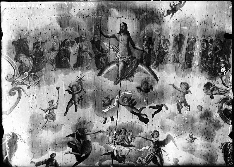 Takmålningar från 1671 och 1743. Snabbinventering. Kategori: (03) Målningar på träTakmålningar från 1671 och 1743. Snabbinventering.